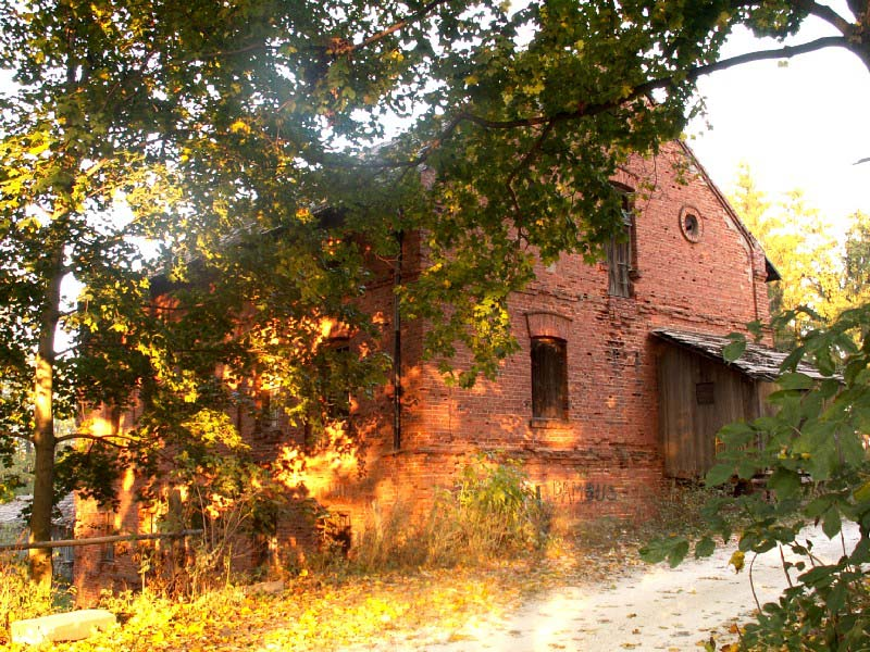 Suchedniów - Stary Młyn w Jędrowie (obecnie ul. Koszykowa)